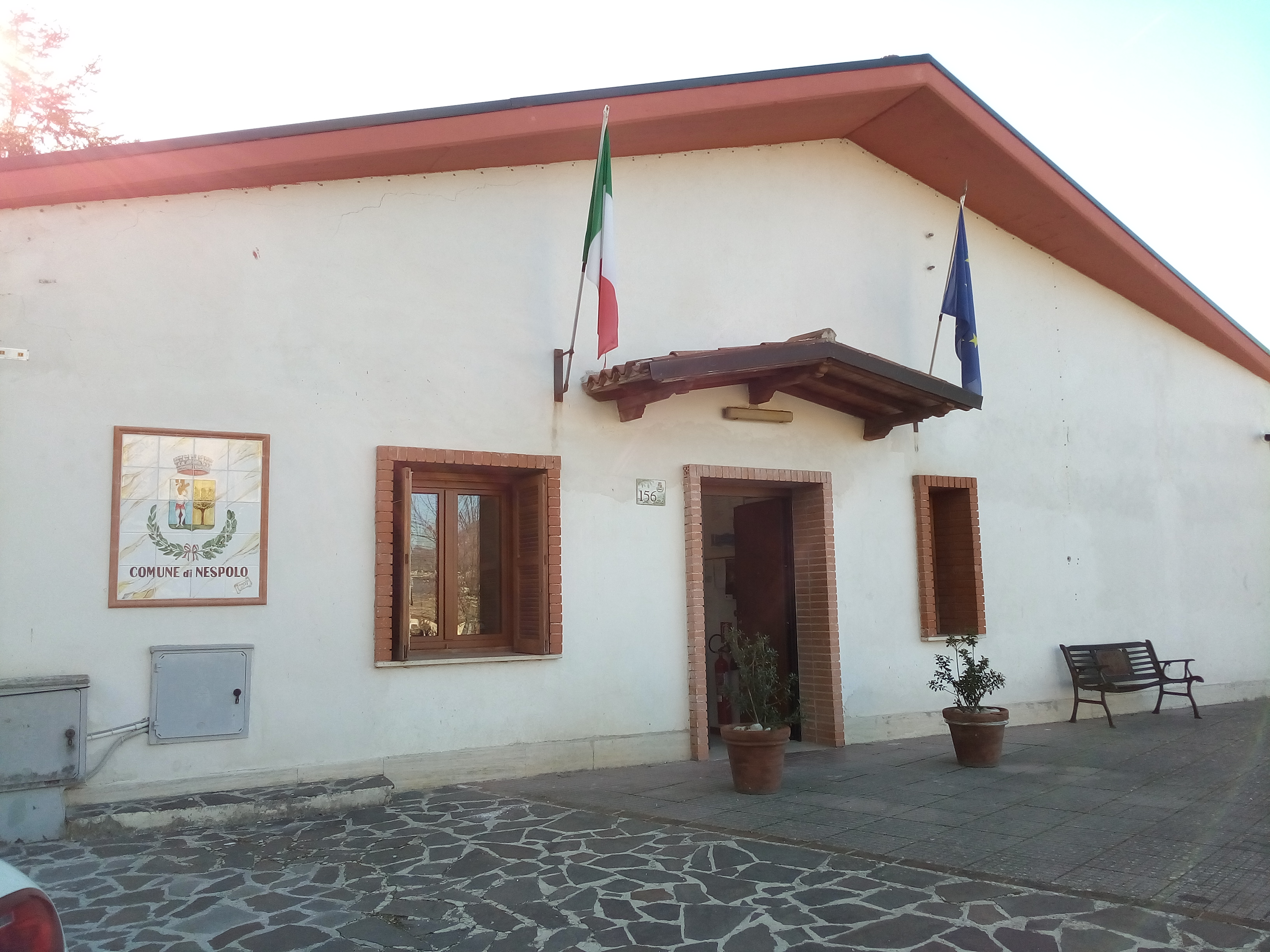 Casa comunale di Nespolo (RI), Italia